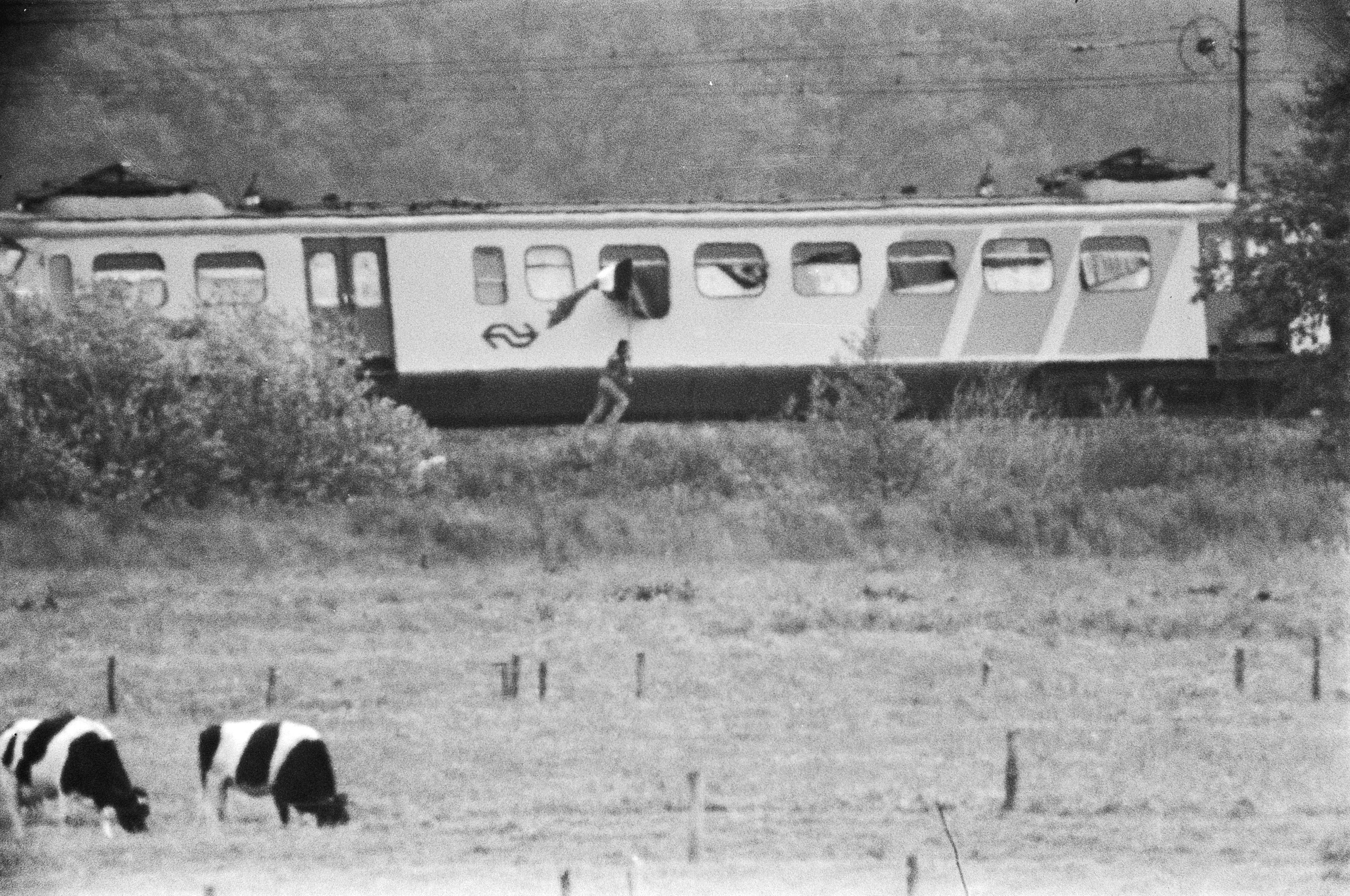 Dag 14 van de treinkaping bij De Punt. Gijzeling in trein bij De Punt (14e dag); een van de kapers brengt RMS-vlag naar de ingang van de trein.